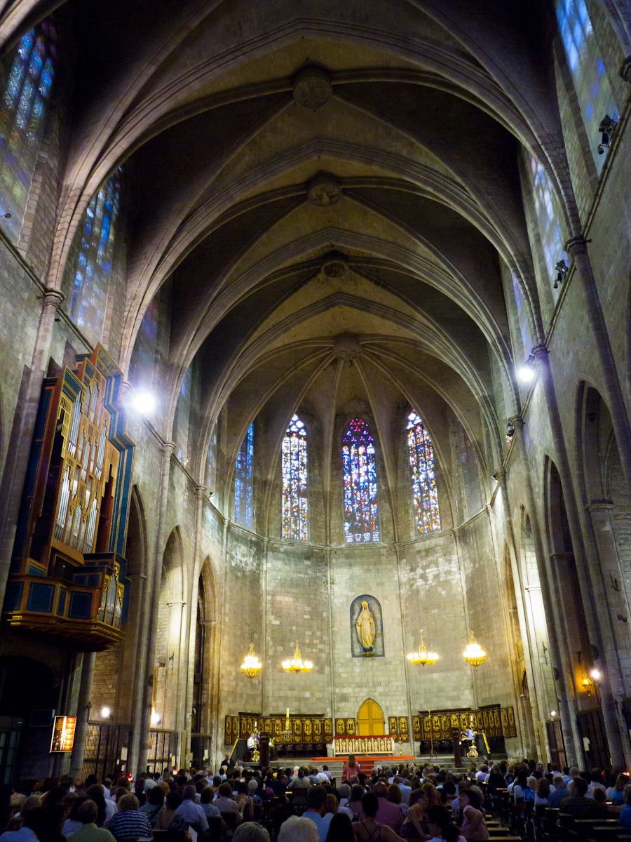 Barcelona Interior 68 02 de julio de 2011